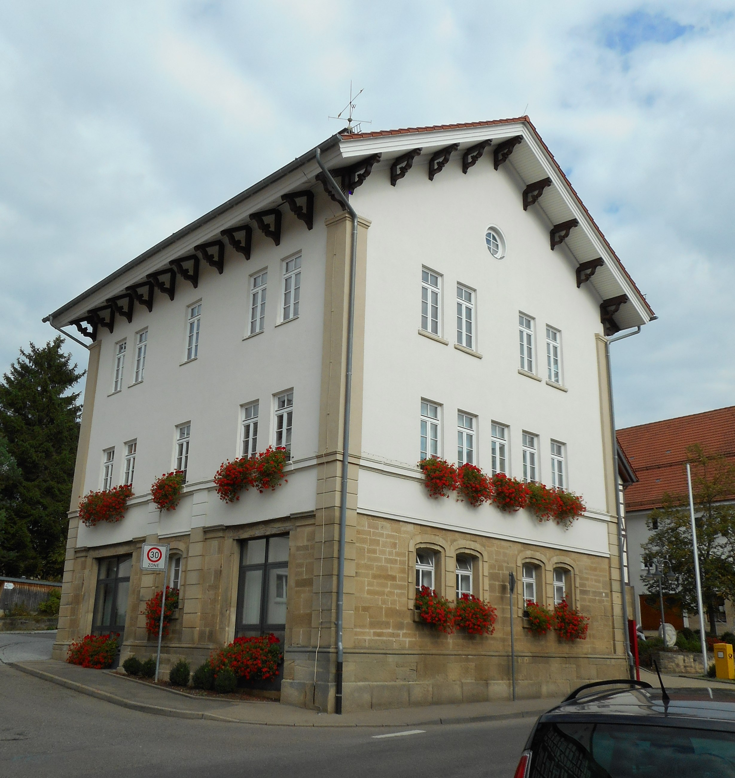 Das Rathaus von Walddorfhäslach Ortsteil Walddorf